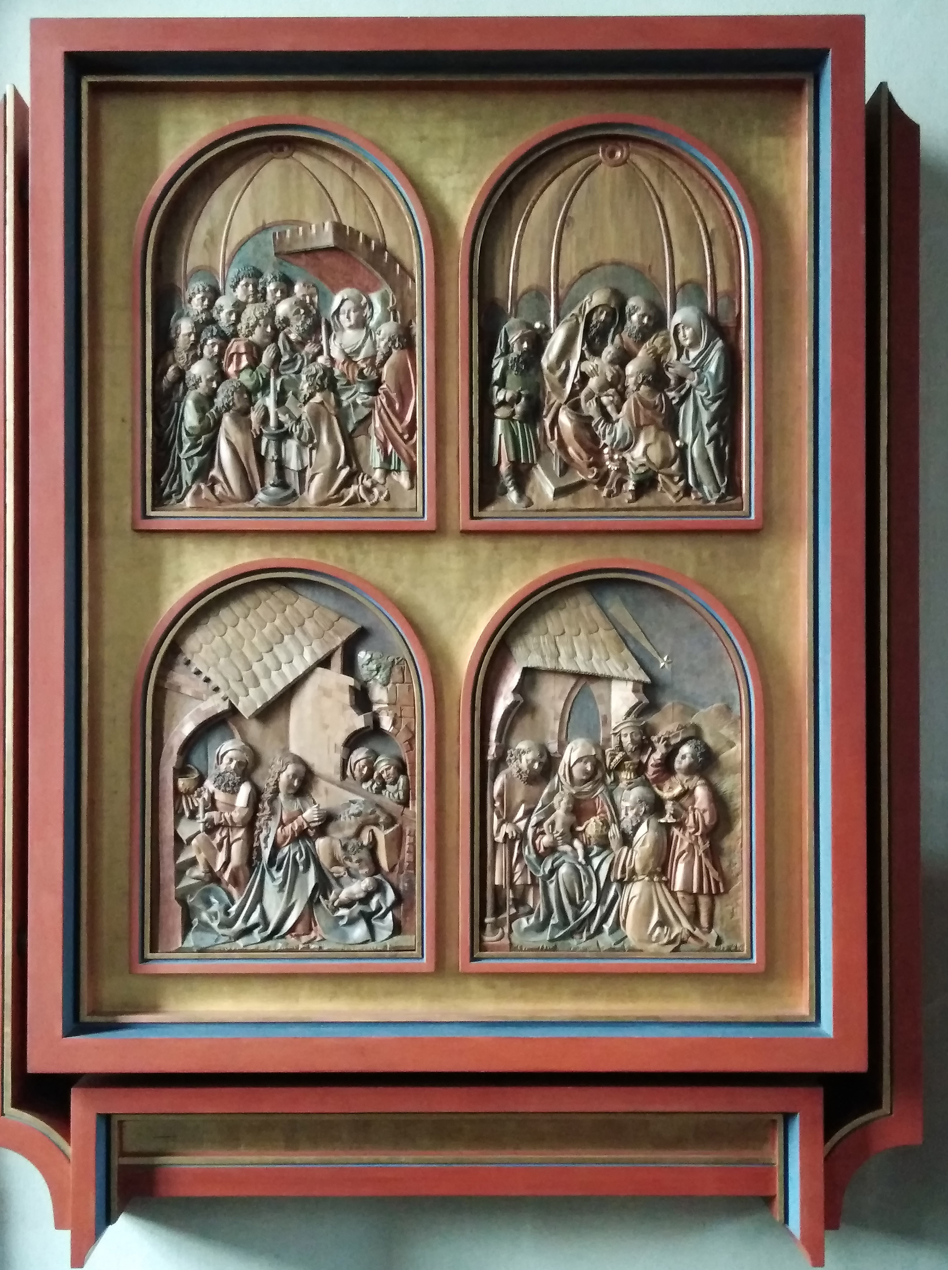 St. Gallus Villingendorf Kindheit Jesu, Tod Mariens. Flügelaltar der 1810 abgebrochenden Johanniterkirche